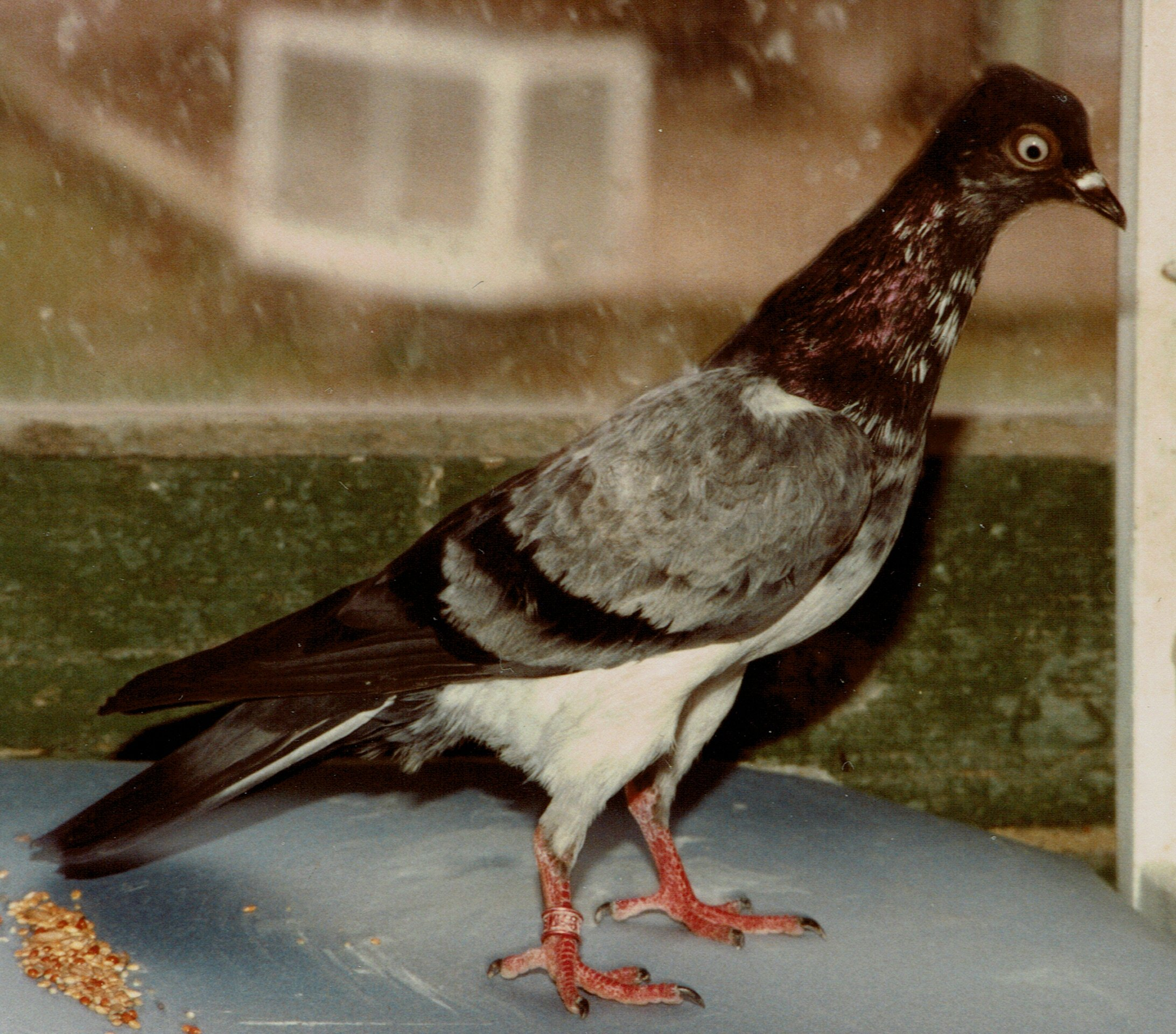 Wiener violette Dunkelgestorchte von Alfred Baldia